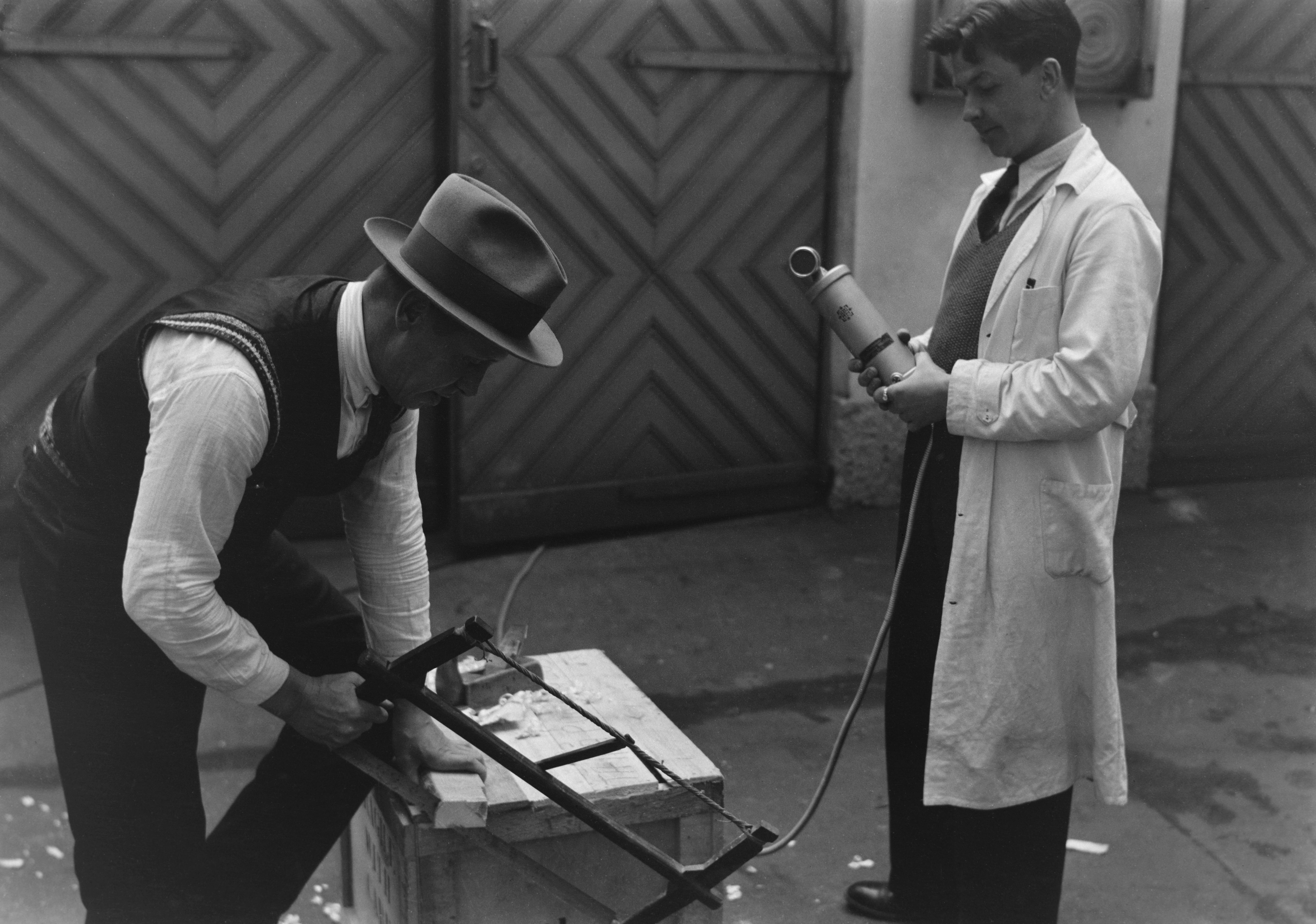 Radion äänitehosteen äänitys. Kuvausaika on arvioitu vuosikymmenen tarkkuudella. Tiedätkö jotain tästä kuvasta? Jätä kommentti tai ota yhteyttä sähköpostitse: Tutustu Ylen arkistosisältöihin: Fler skatter från Yles arkiv: More about Yle, the Finnish Broadcasting Company